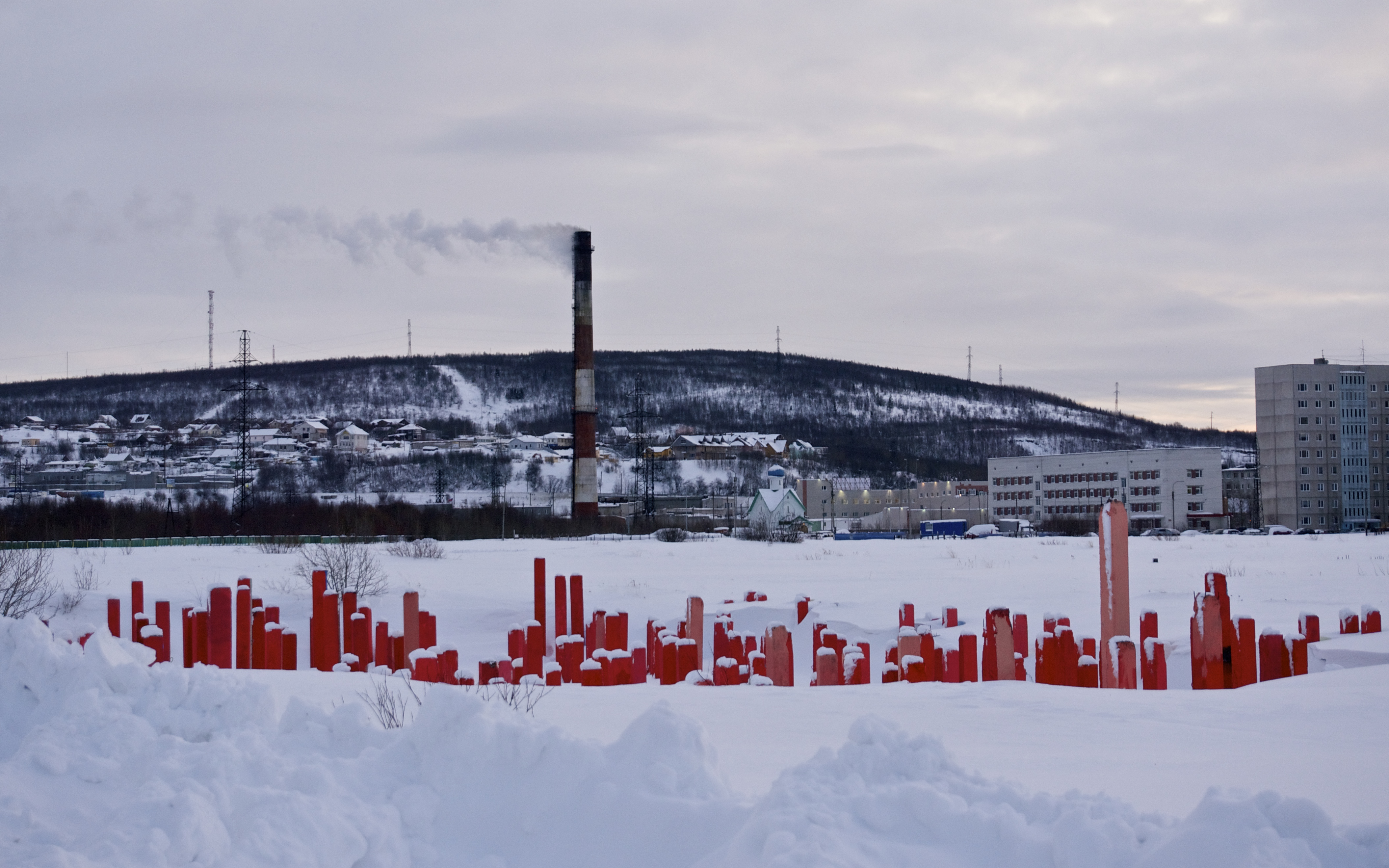 Проект “Яма”